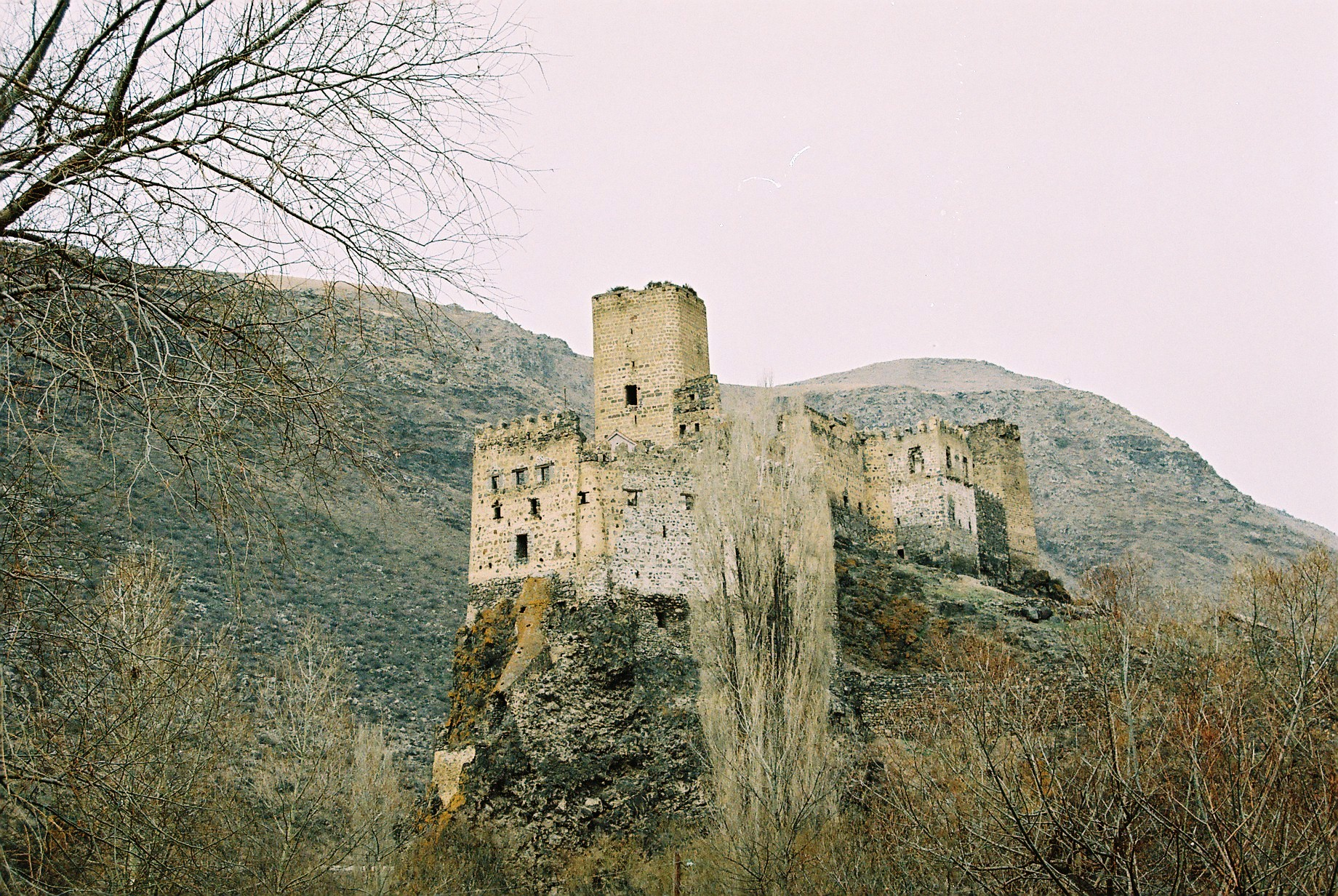 ხერთვისი ციხე